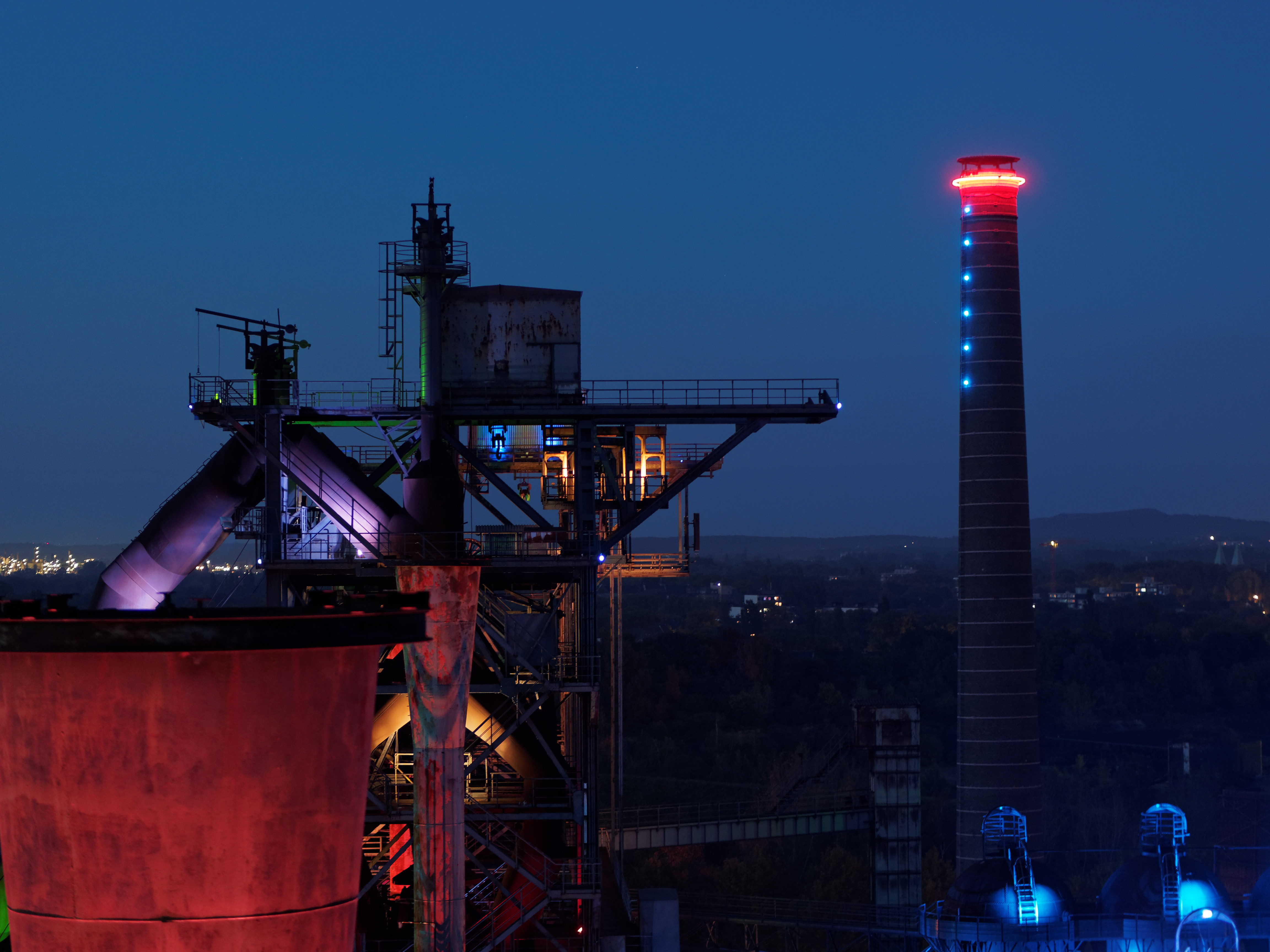 Die Hochöfen 2 und dahinter 1 im Landschaftspark Duisburg, gesehen von der oberen Ebene von Hochofen 5 This image shows a heritage building in Germany, located in the North Rhine-Westphalian city Duisburg-Meiderich/Beeck (no. 506).